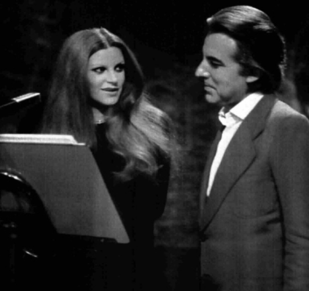 Italian singer Milva and composer Giorgio Gaslini